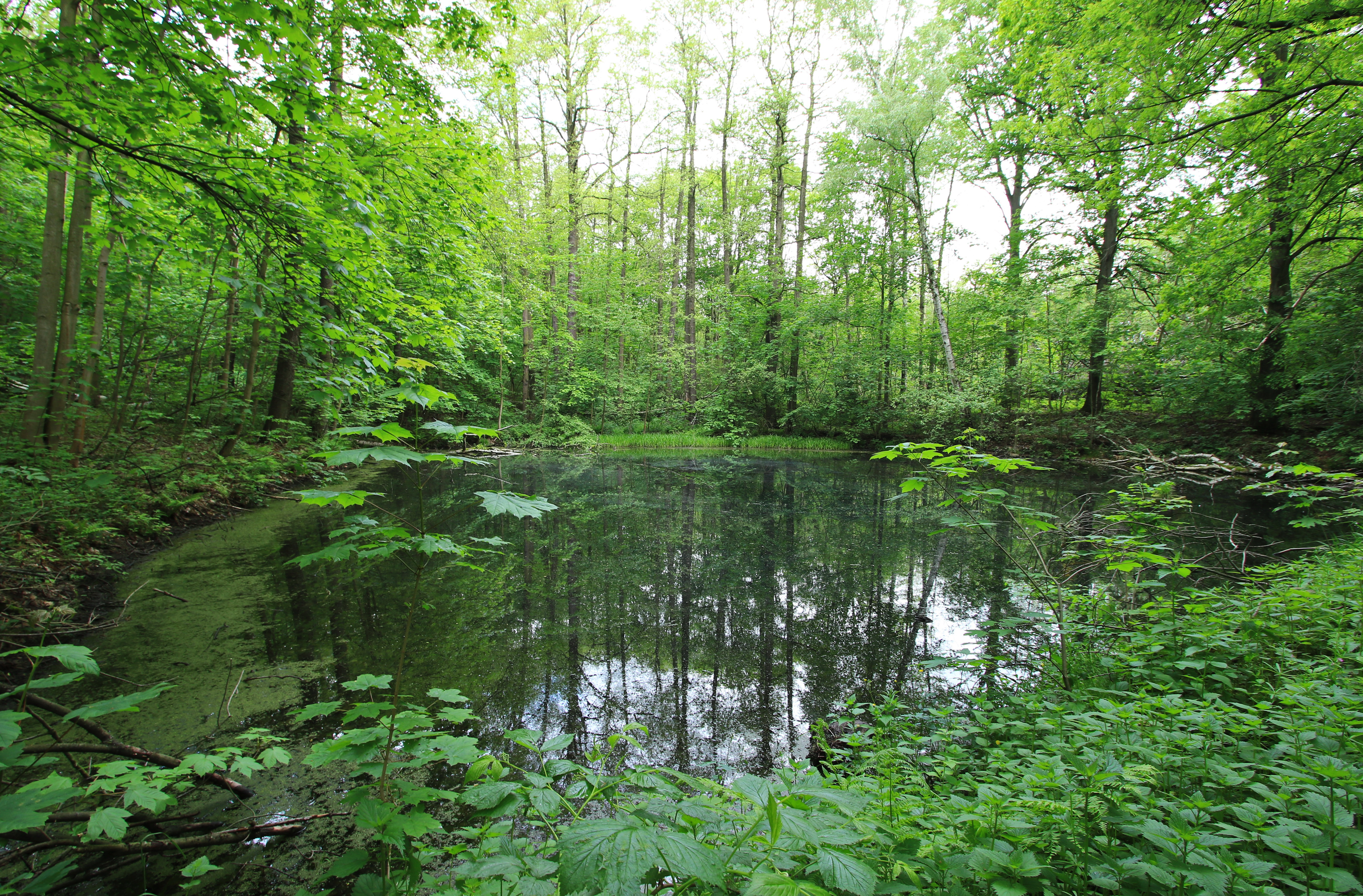 Geschützter Landschaftsbestandteil Schubertgrund in Lichtenstein. Landkreis Zwickau Sachsen. 09350 Am Schubertgrund Strasse.